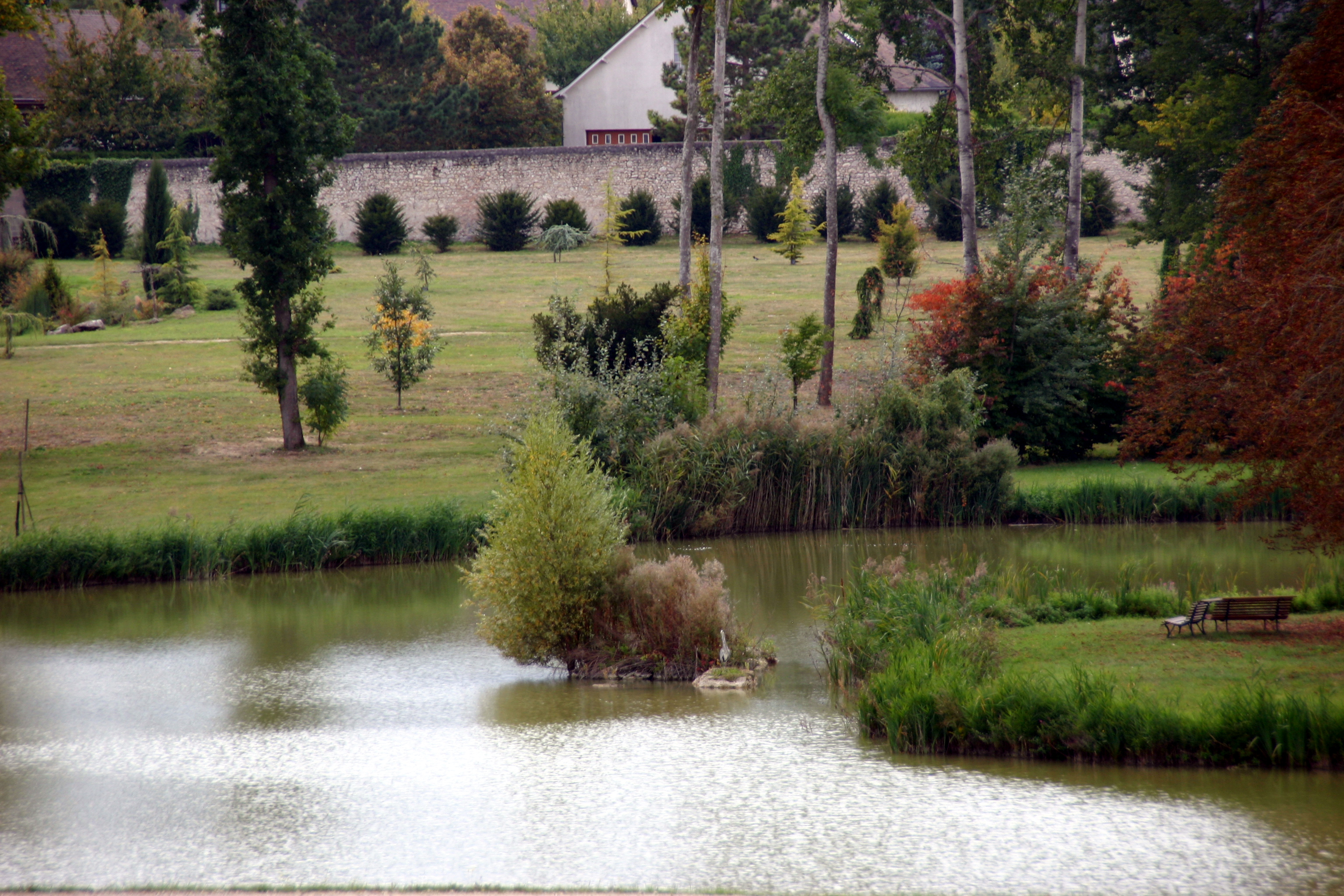 Château de Beauregard